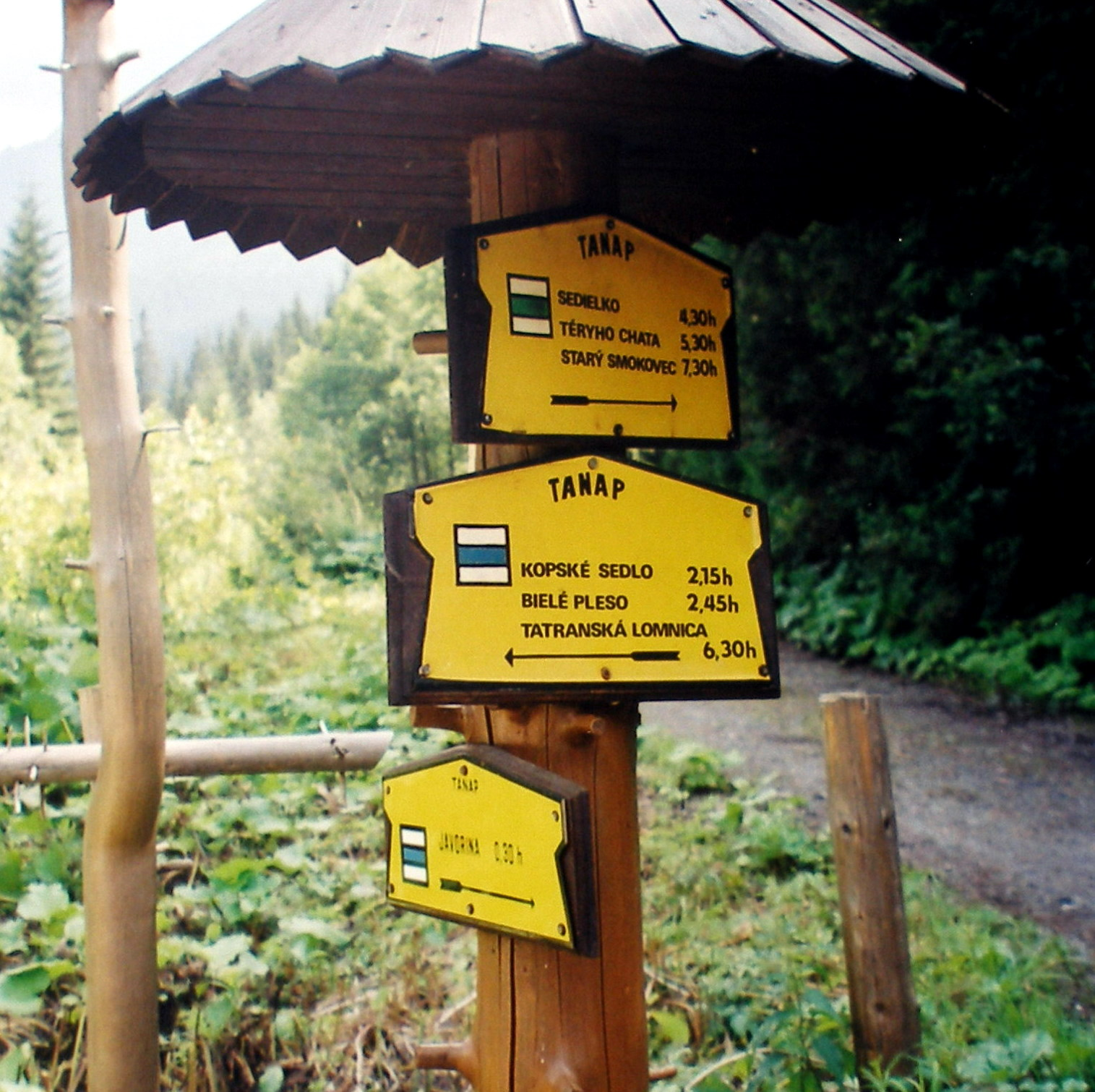 Turistický ukazovateľ.